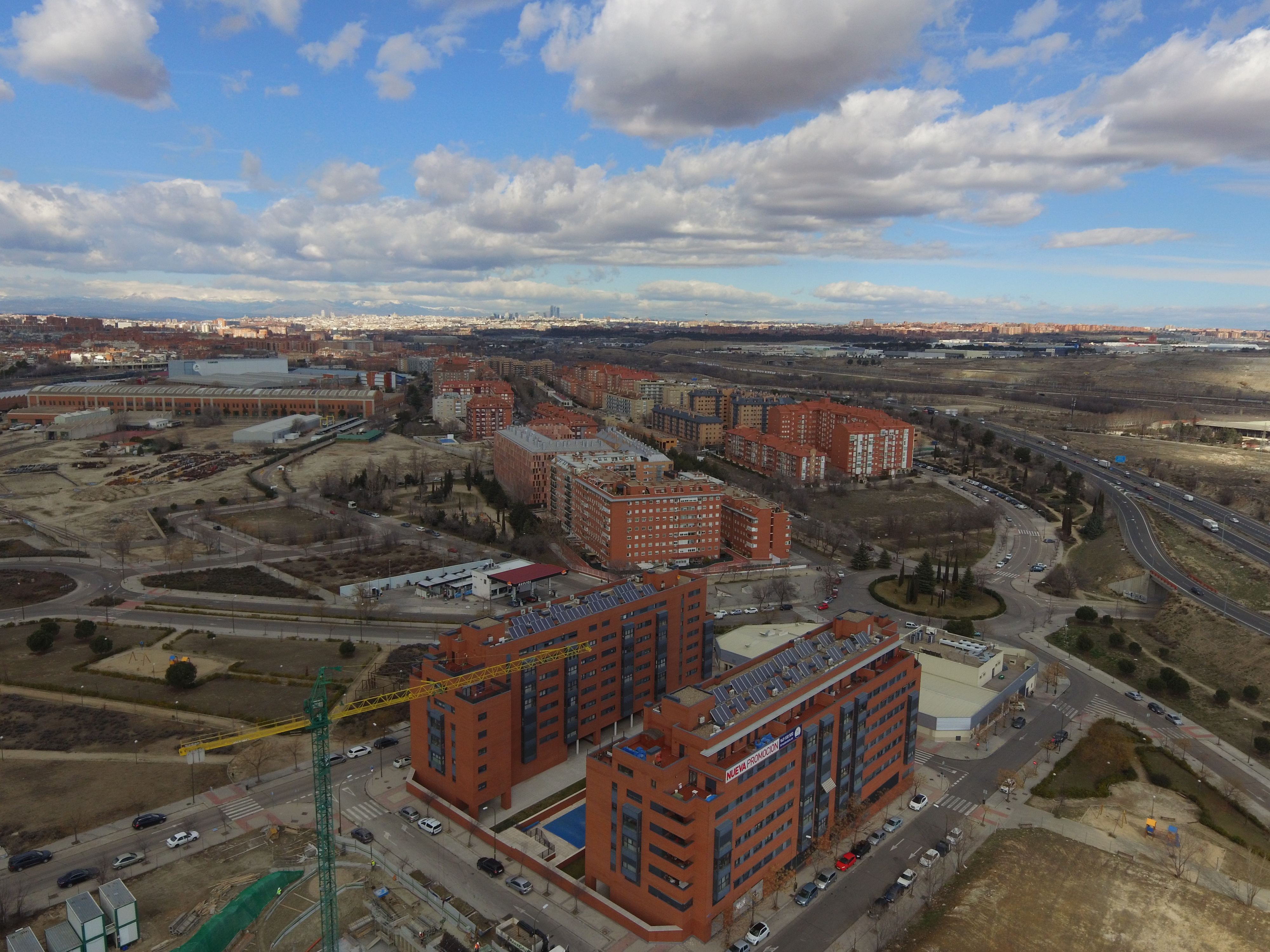 Barrio de Butarque